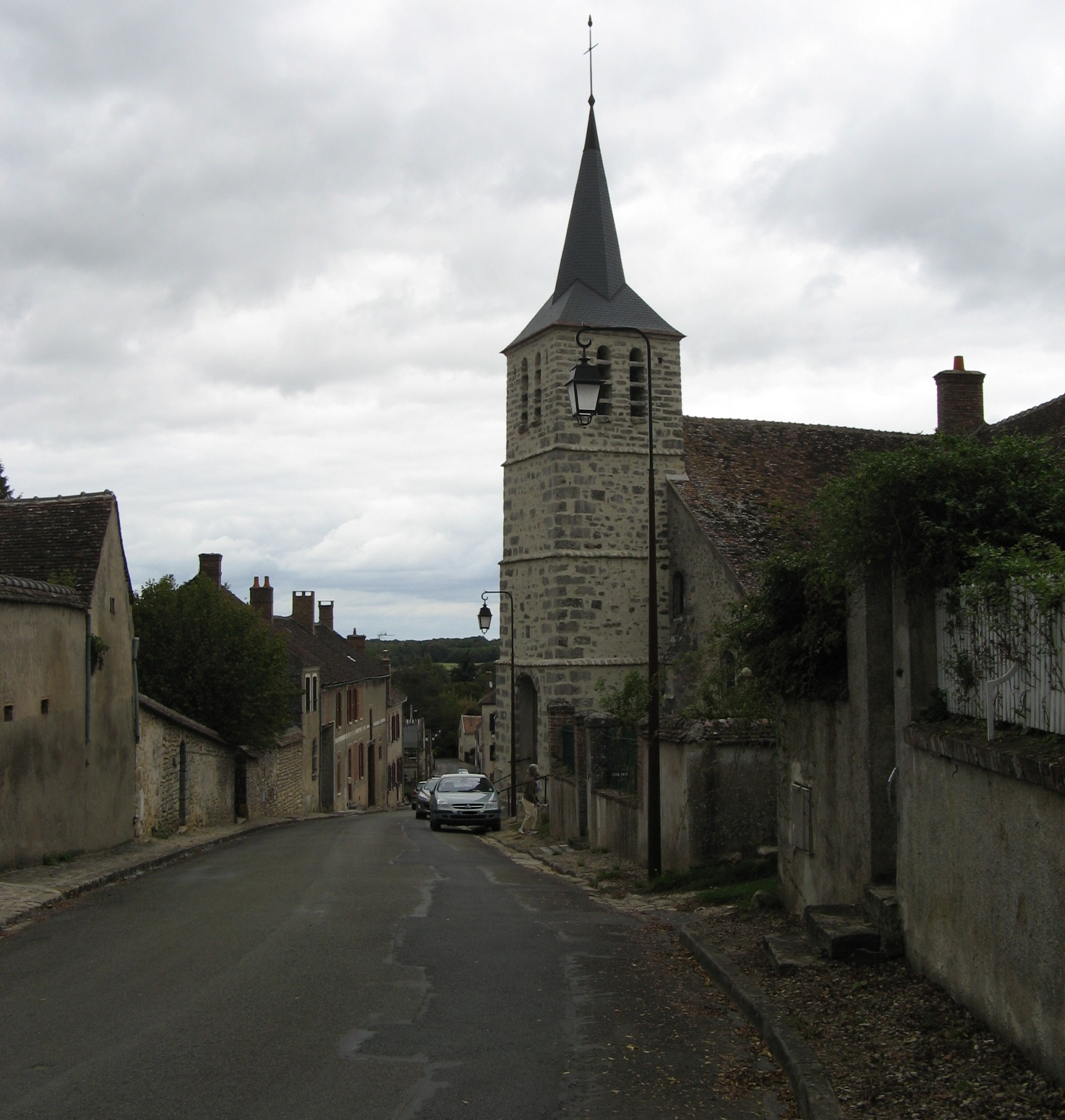 Rue de l'église, avec l'église Saint-Pierre-aux-Liens. Villemaréchal, France.